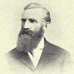 Malcolm McGugan